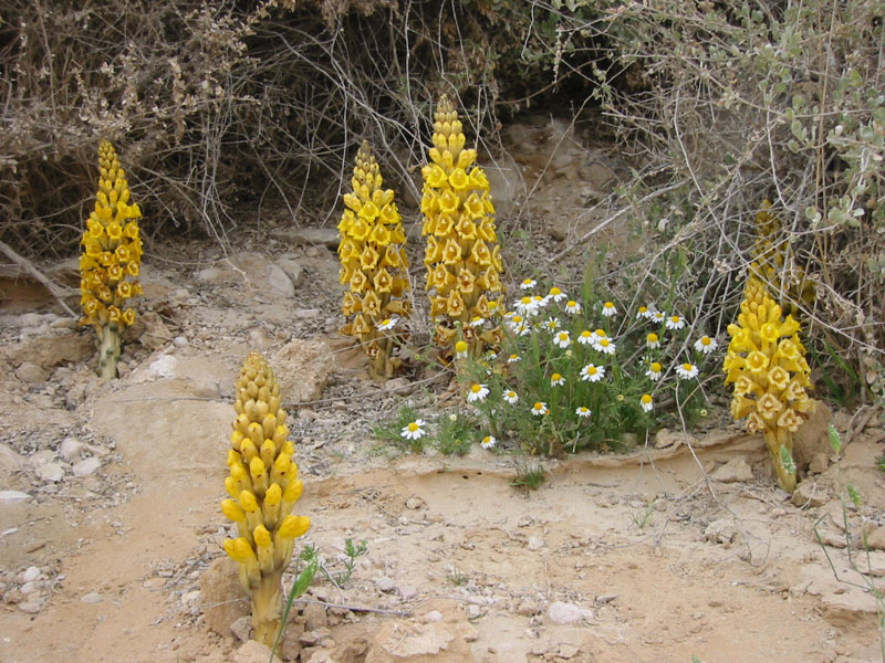 Cistanche tubulosa in der Negev bei Stey Boker, Israel